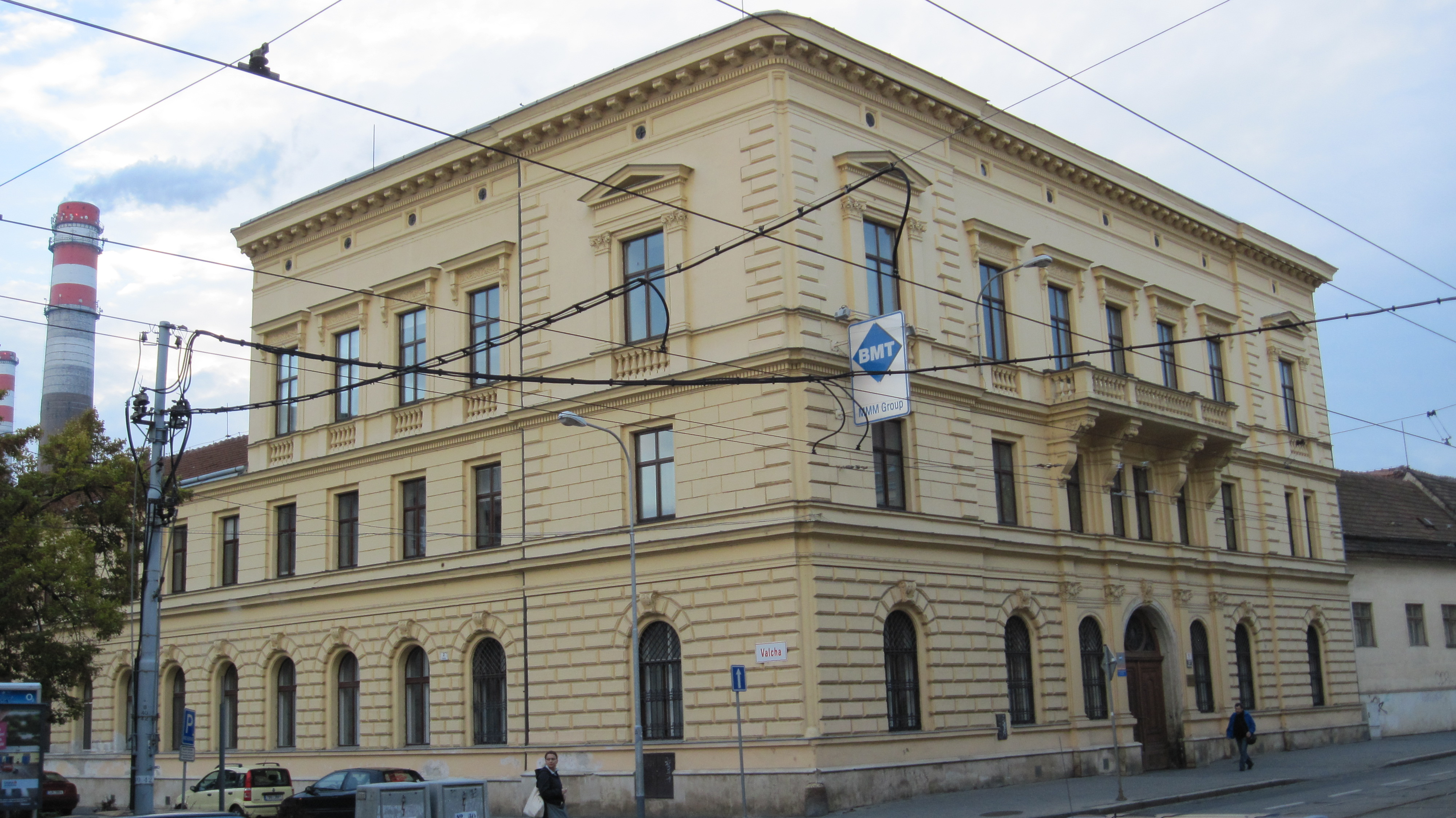 Palác Gustava Adolfa Schoellera, Josef Arnold 1868. Brno, Cejl 50